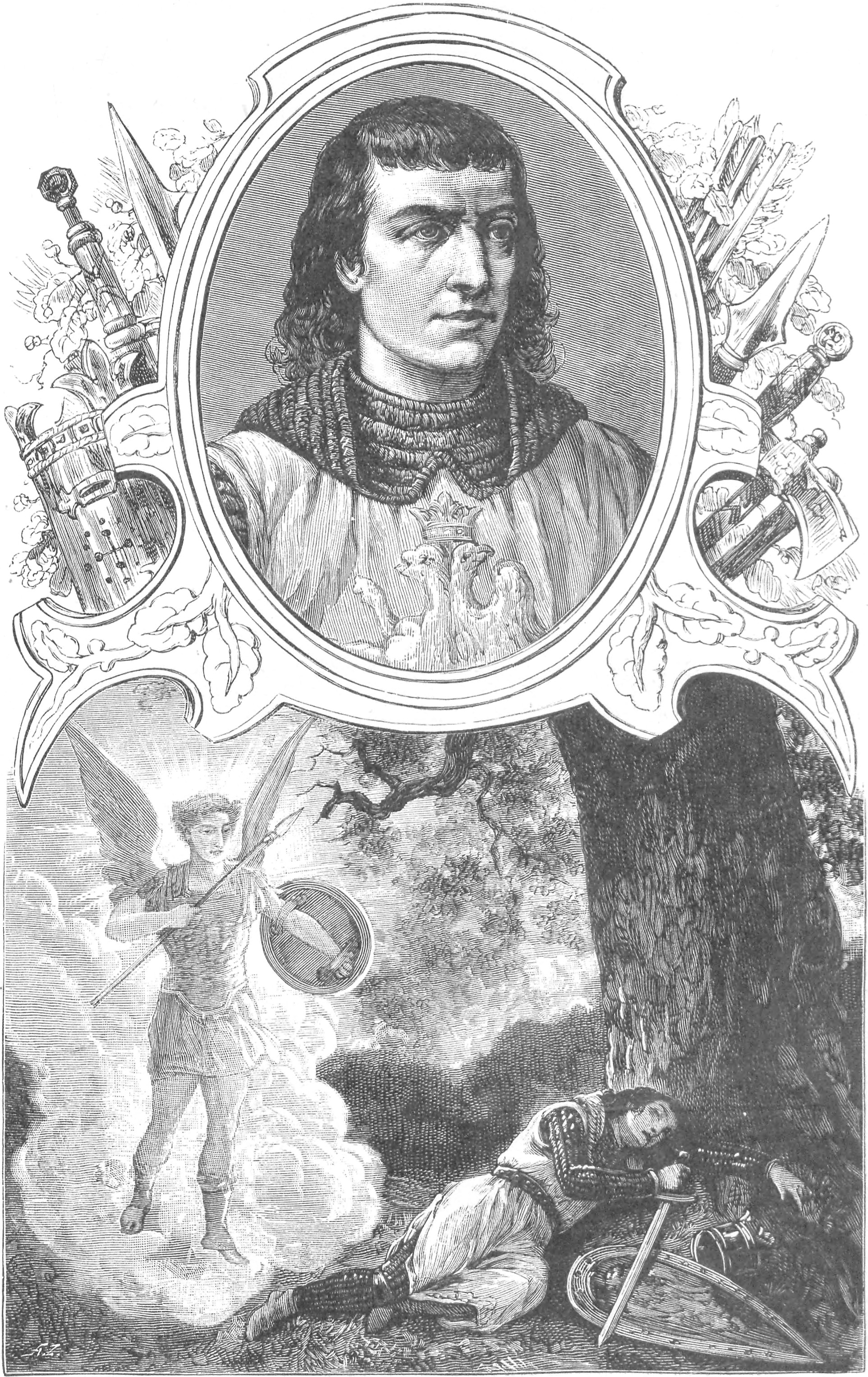 ilustracja z książki „Wizerunki książąt i królów polskich“